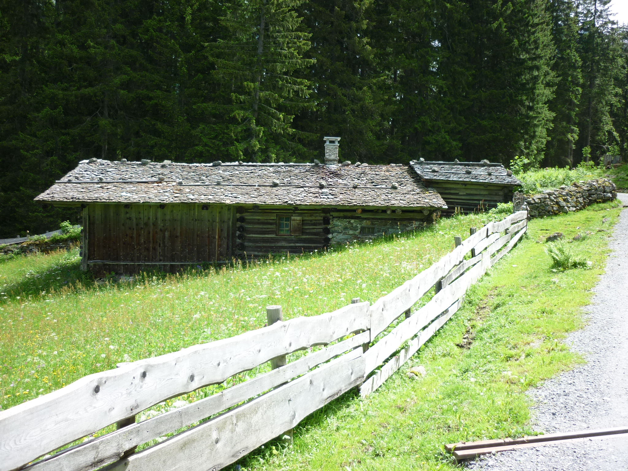 Alphütte, Klosters GR, Schweiz